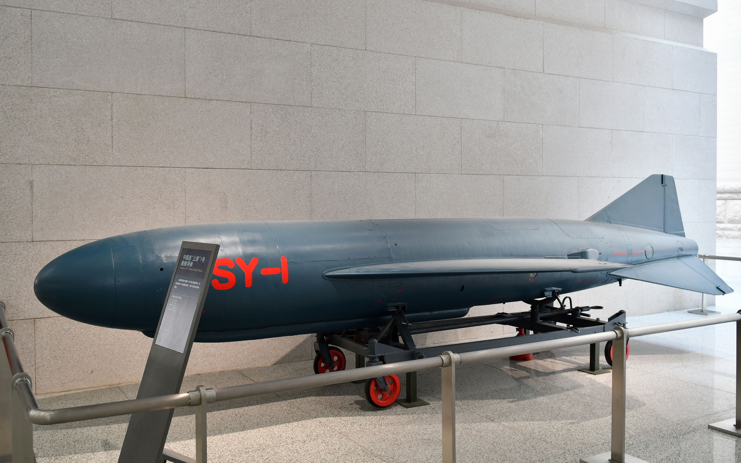 “上游”1号反舰导弹，拍摄于中国人民革命军事博物馆。